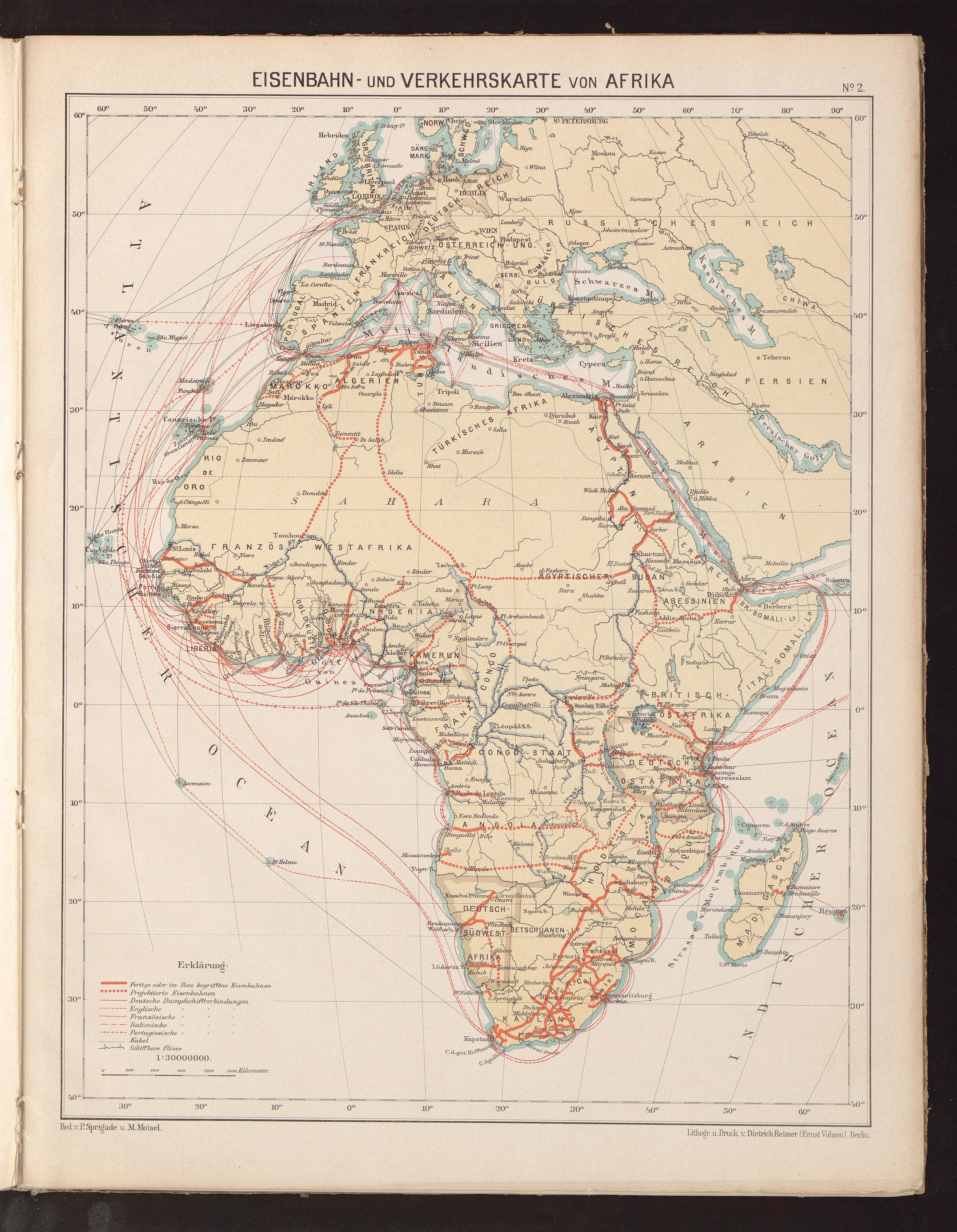 Wirtschaftsatlas der Deutschen Kolonien